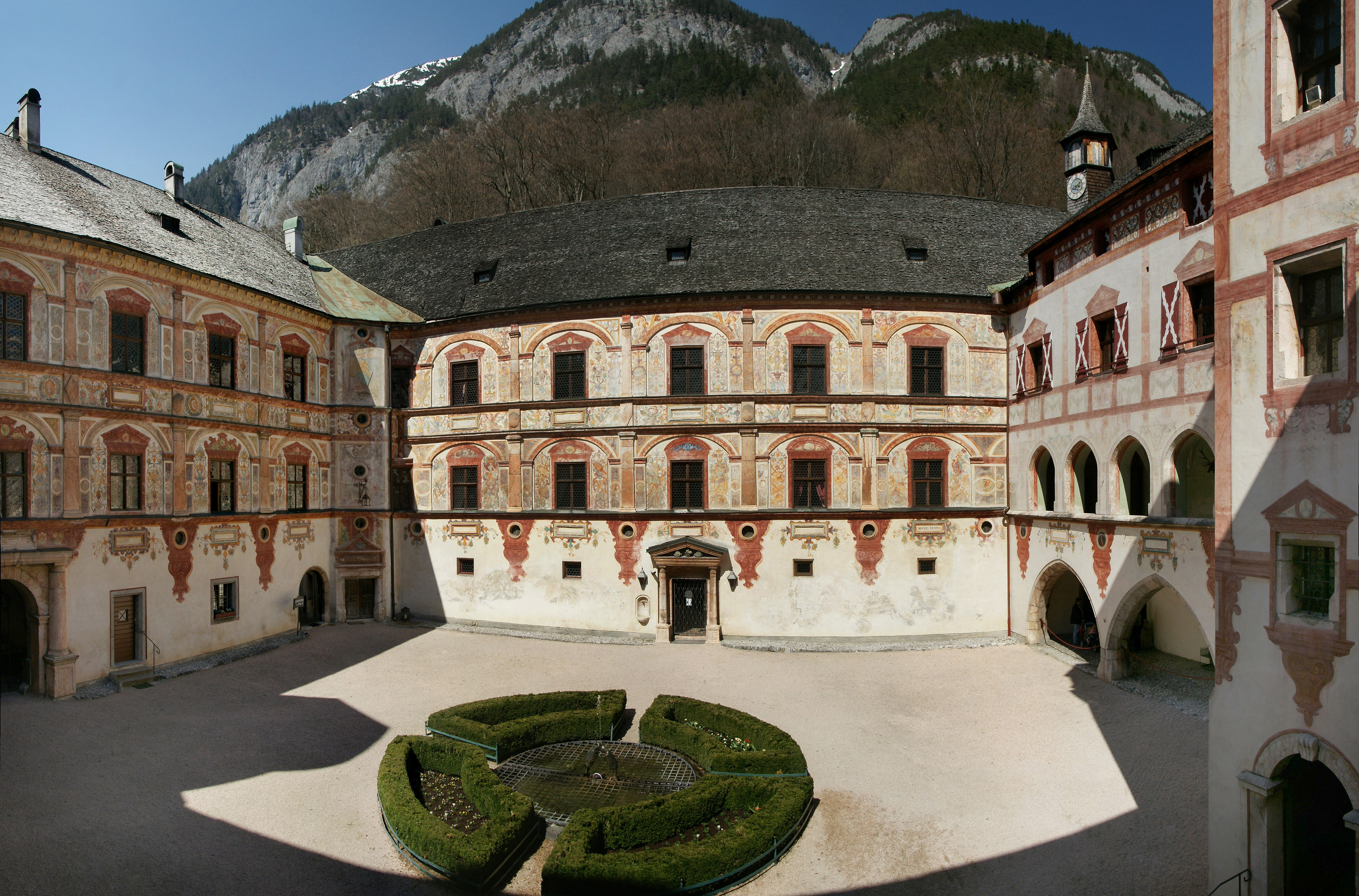 Panorama aus mehreren Bilder im Innenhof vom Schloss Tratzberg.